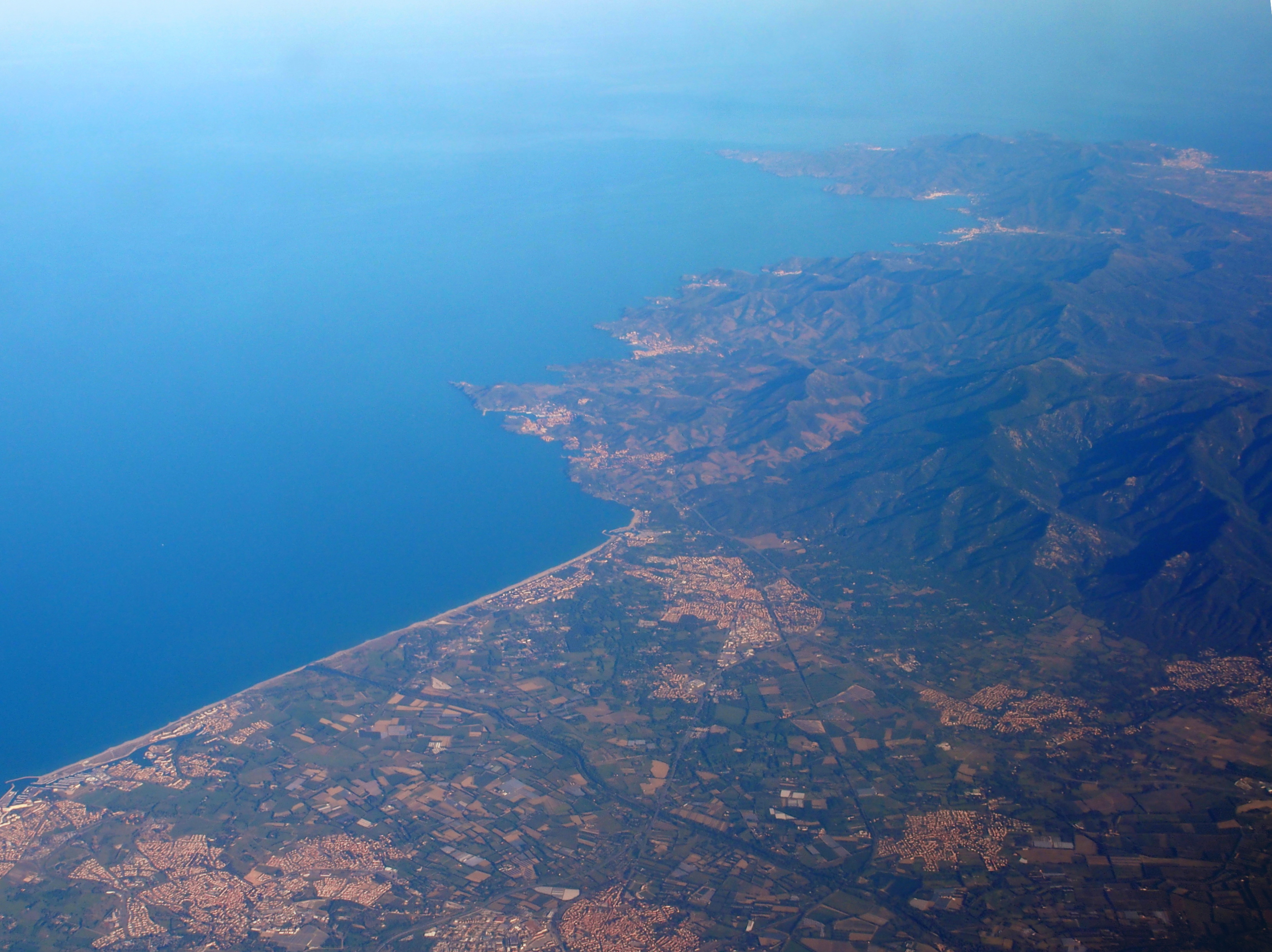 Vue aérienne d'Argeles-sur-Mer (au centre) au pied des Pyrénées (2016)